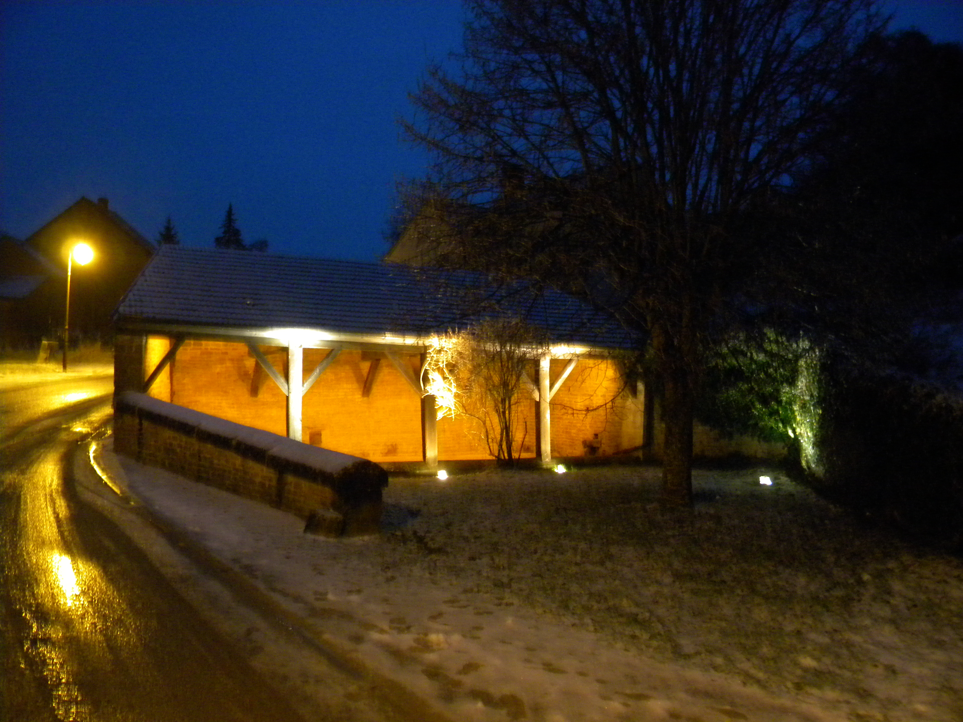 Lavejo